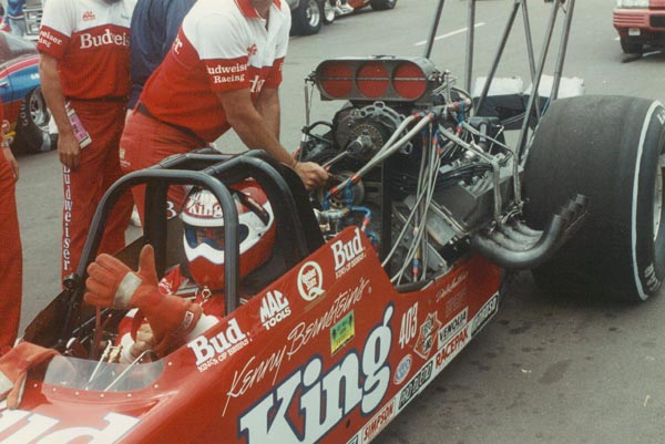 Kenny Bernstein, Denver 1996